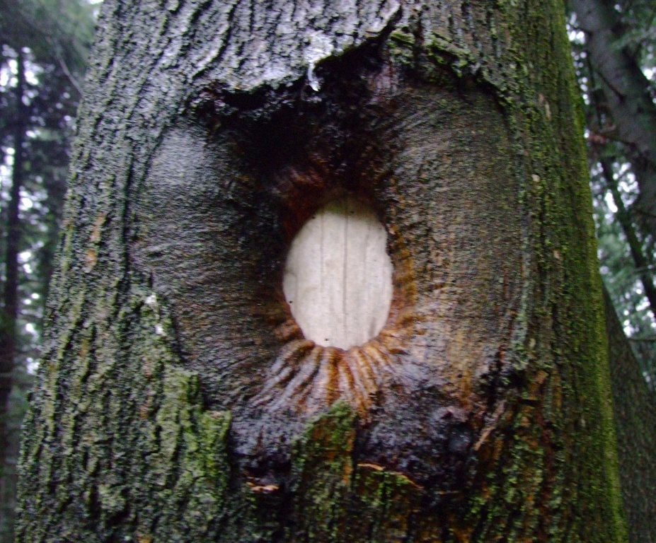 Kallus (Tilia cordata)